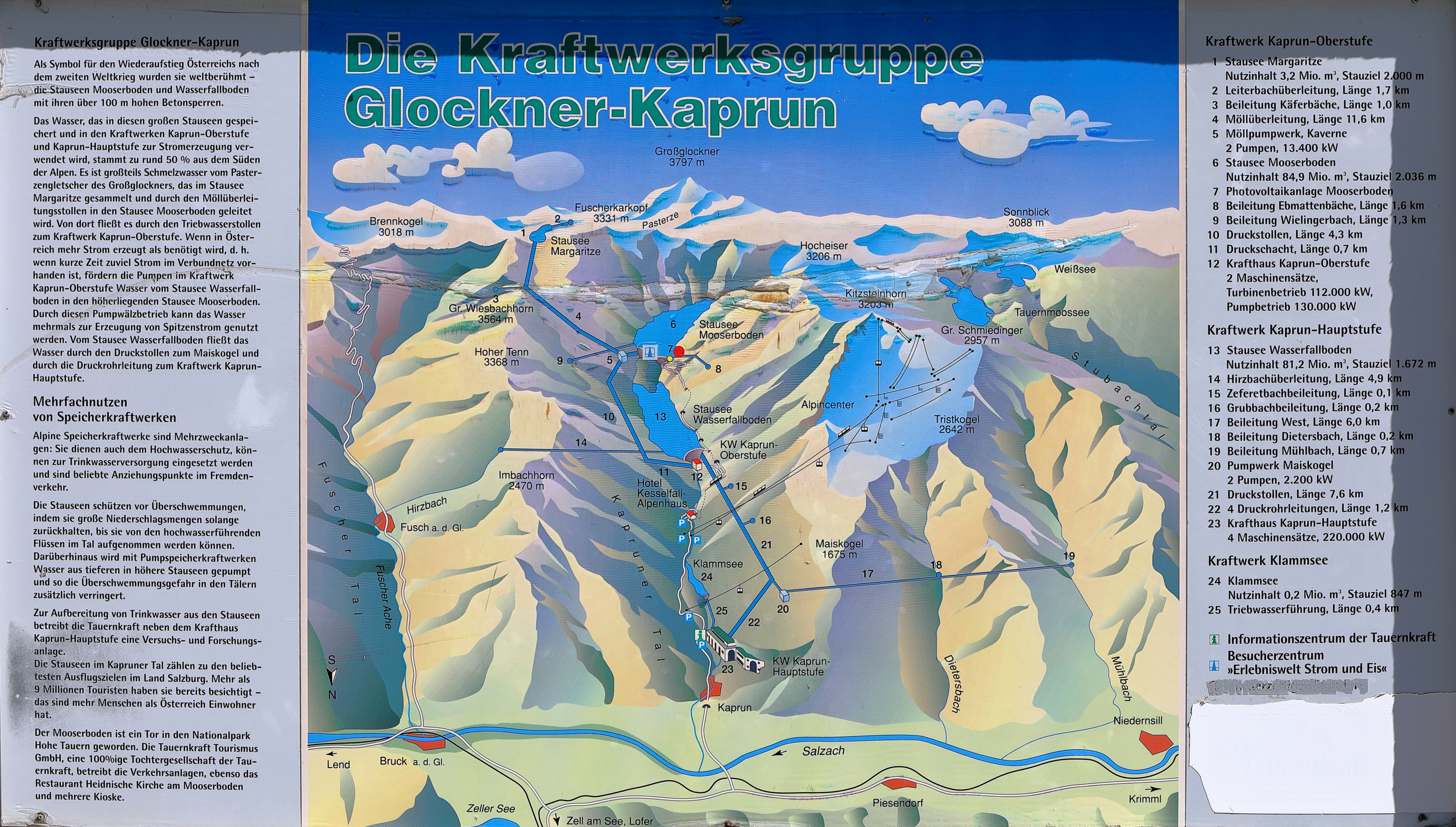 Infotafel über die Kraftwerksgruppe Glockner-Kaprun, die fix montiert und öffentlich zugänglich beim Stausee Margaritze aufgestellt ist.